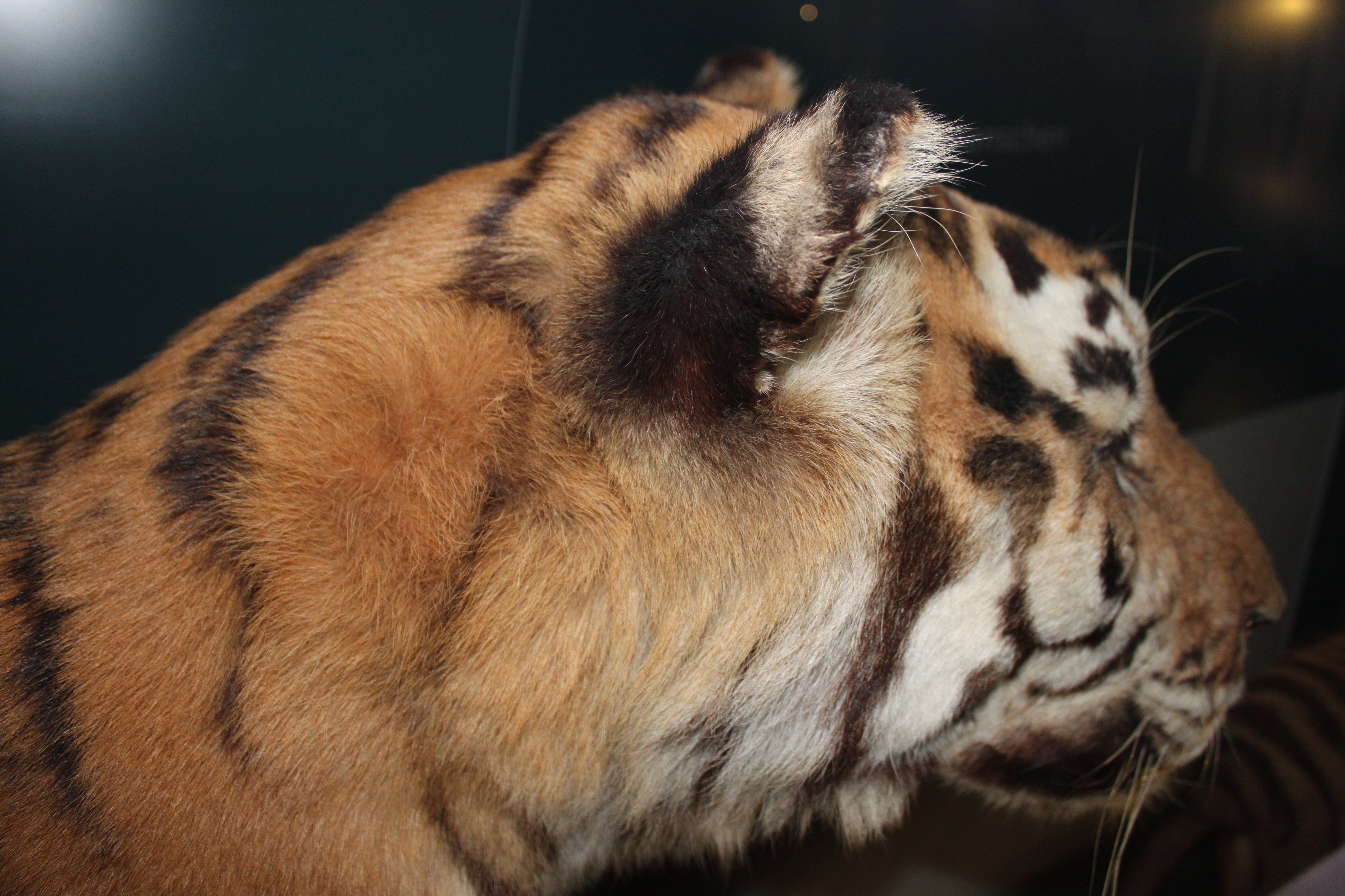 Präparierter Tiger im Naturkundemuseum Berlin